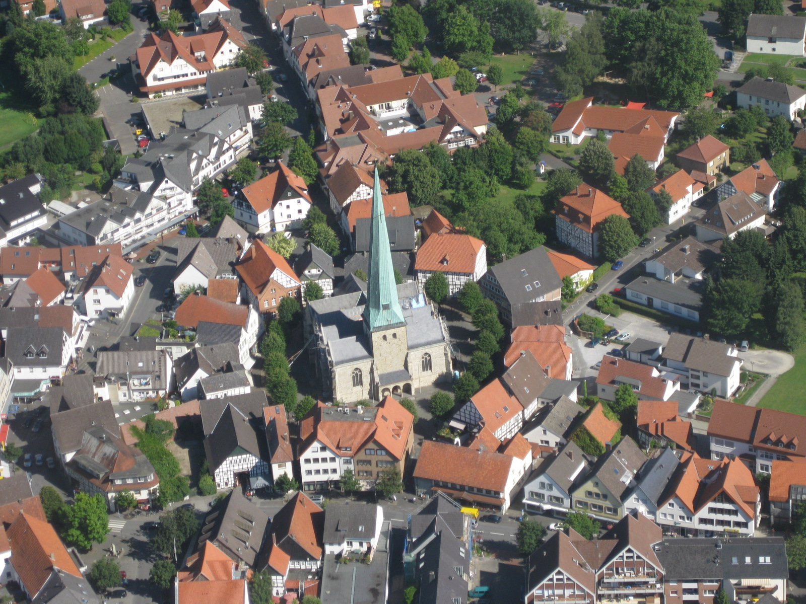 Das Bild zeigt den Stadtkern von Delbrück mit der historischen Kirche